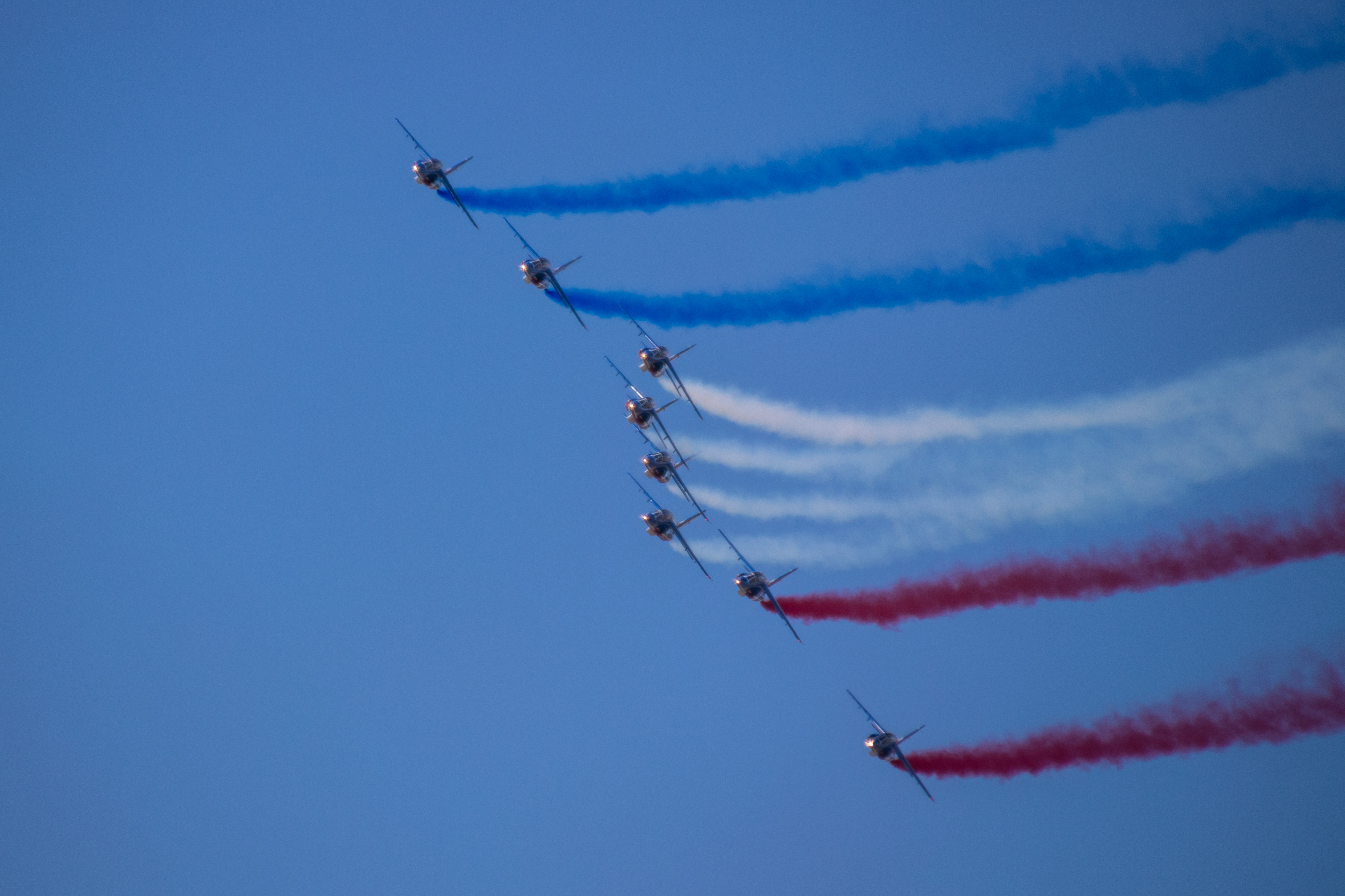 Virage de la Patrouille de France au meeting d'Orange 2019.